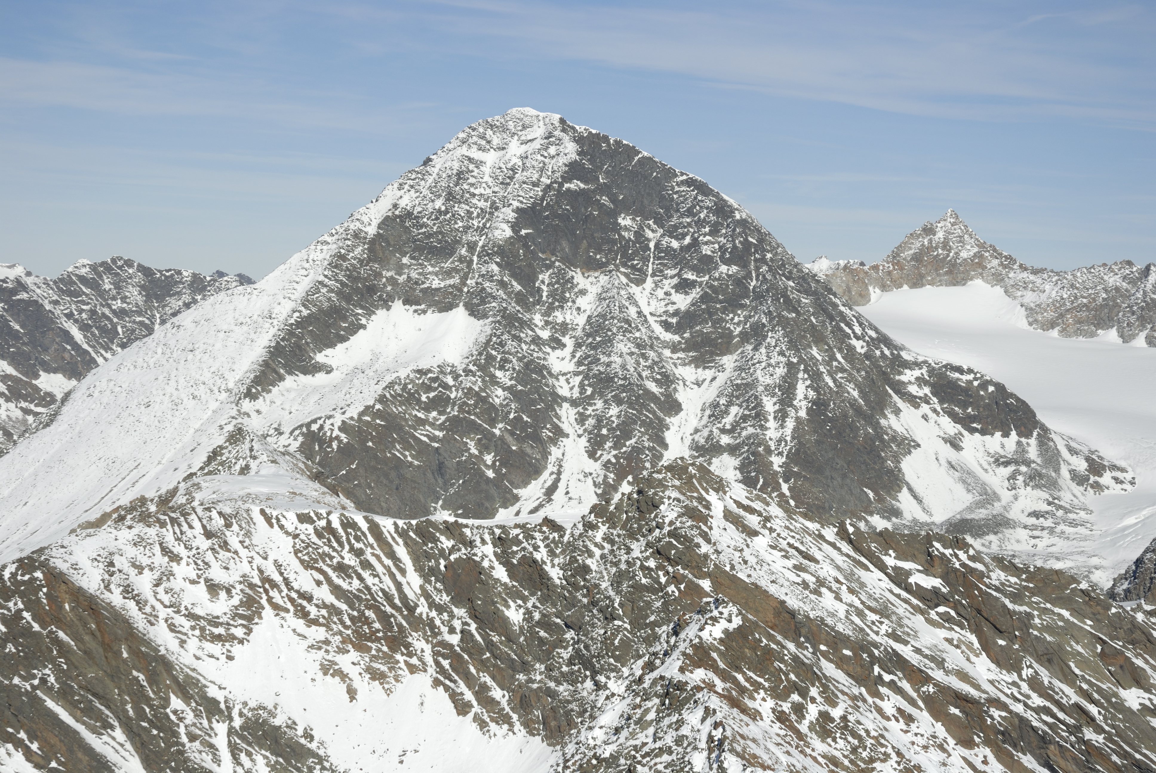 Schrankogel und Schrandele mit dem Schwarzenbergferner von Süden (Hinterer Daunkopf)